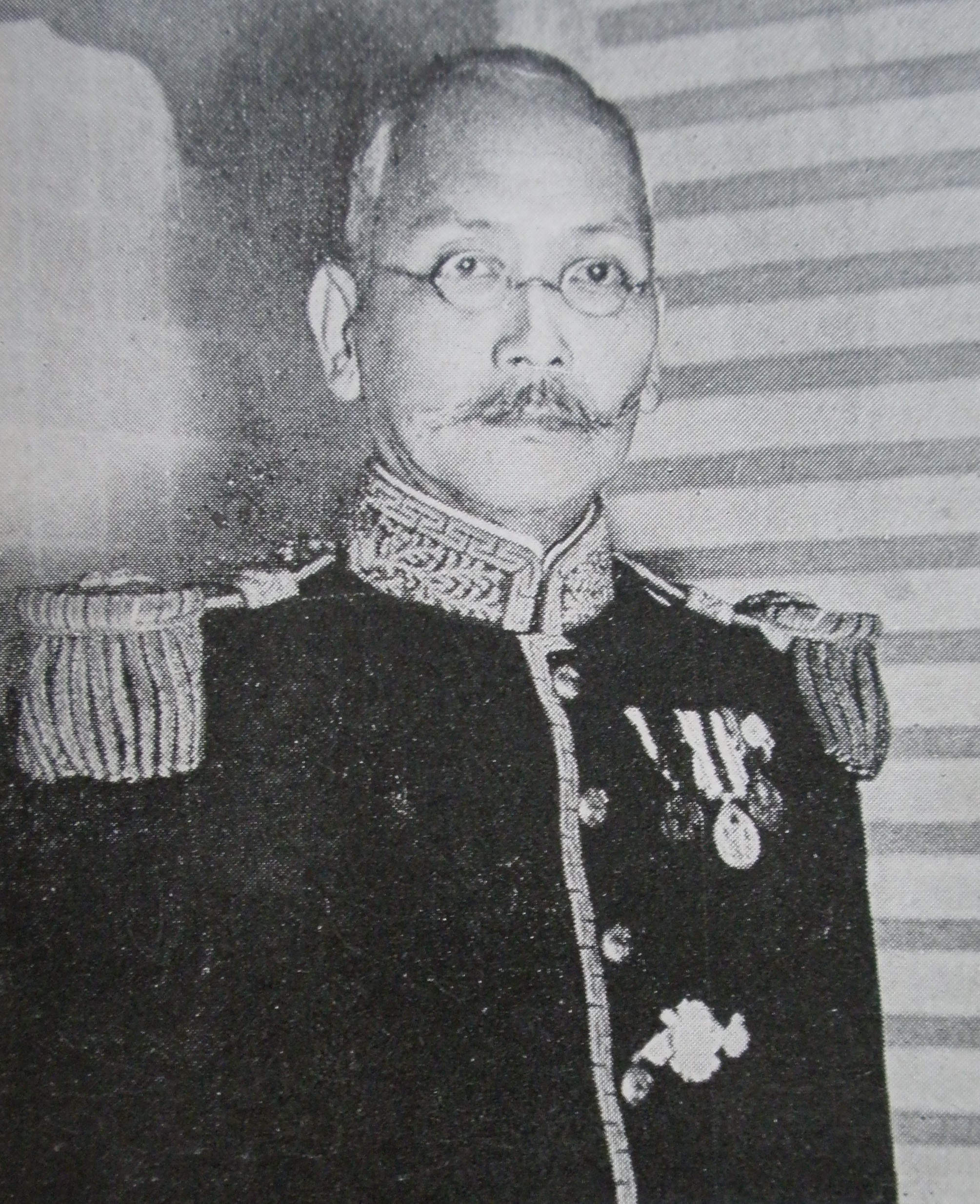 貴族院議員・男爵北島斉孝